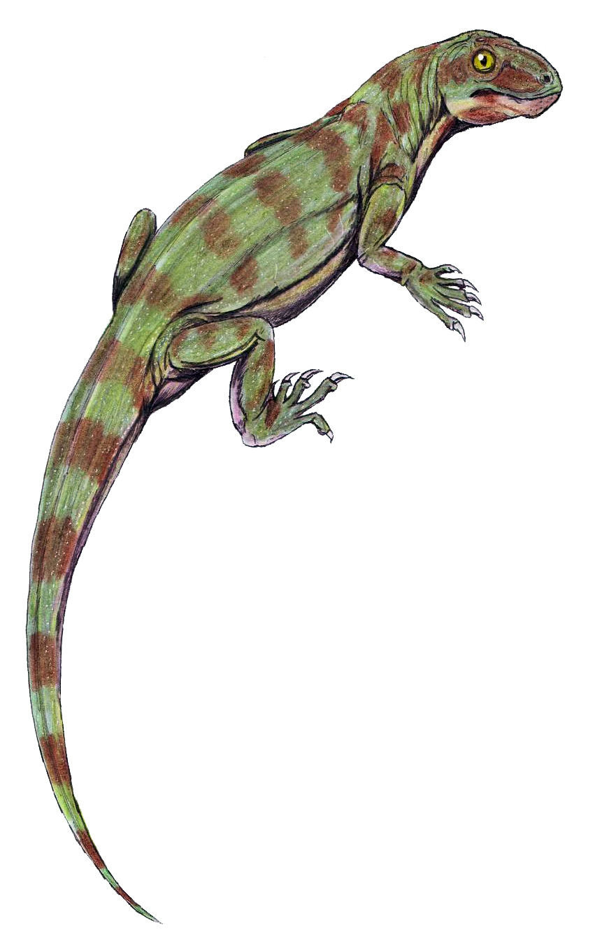 Galechirus